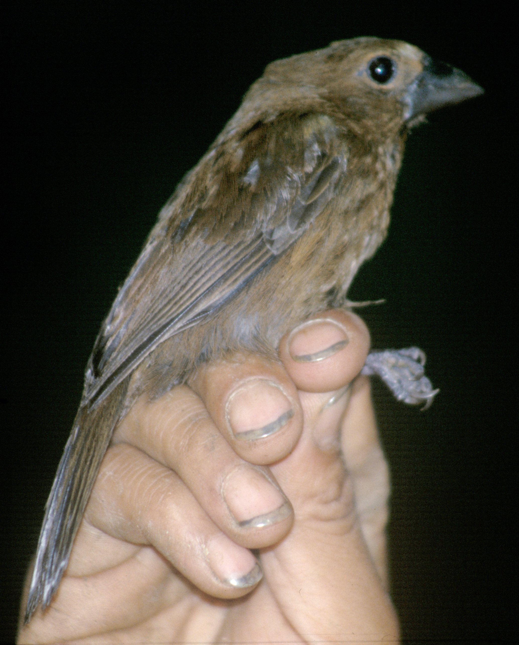 Blue-black Grosbeak (Cyanocompsa cyanoides). Female from Cordillera del Cóndor, Ecuador.